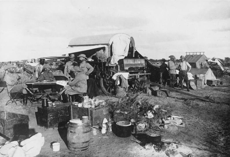 Deutsch-Südwestafrika, Herero-Aufstand Deutsch-Südwestafrika Stabswagen im Biwak von Onjatu 1904 [Deutsch-Südwestafrika, Onjatu.- Stabswagen der deutschen Schutztruppe beim Biwak]